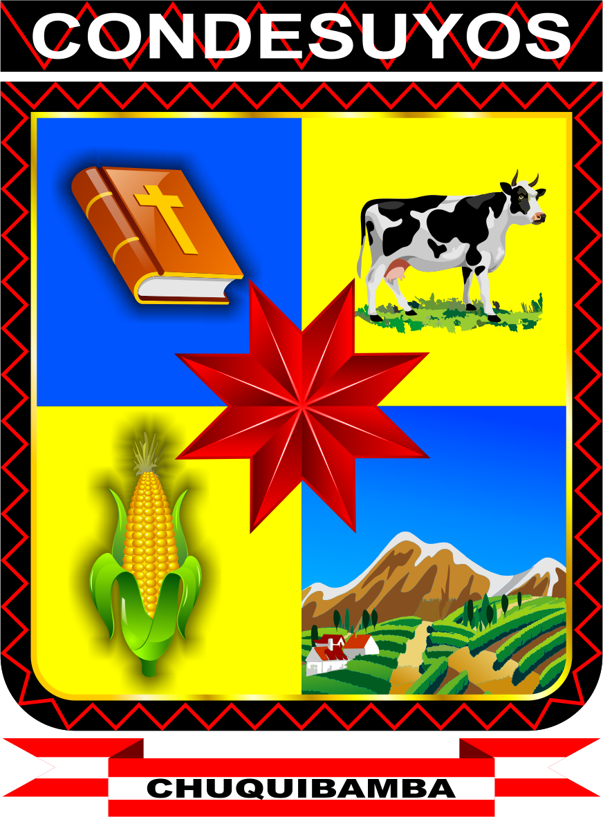 Distrito de Chuquibamba - Provincia de Condesuyos - Región Arequipa